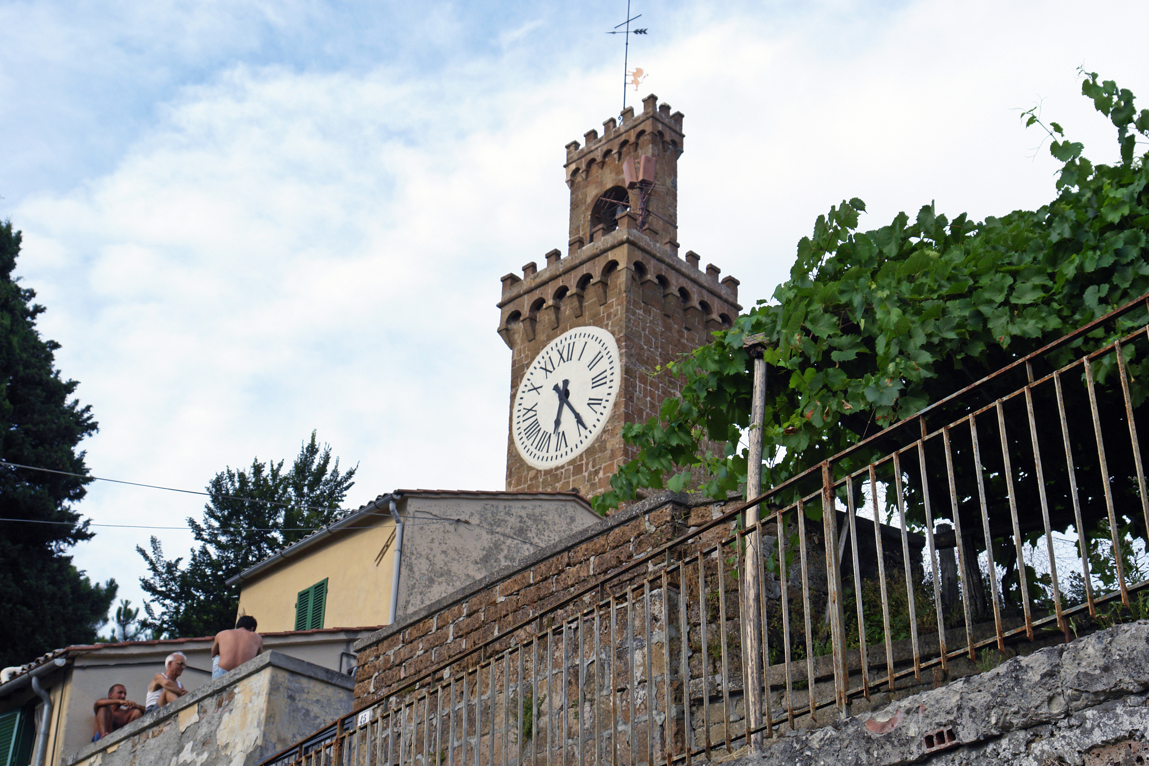 Acquapendente, Uhrturm